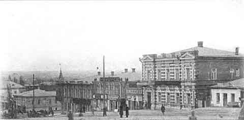 Старий Кам'янськ (сучасний Кам'янськ-Шахтинський)